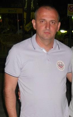 Владан Лукић